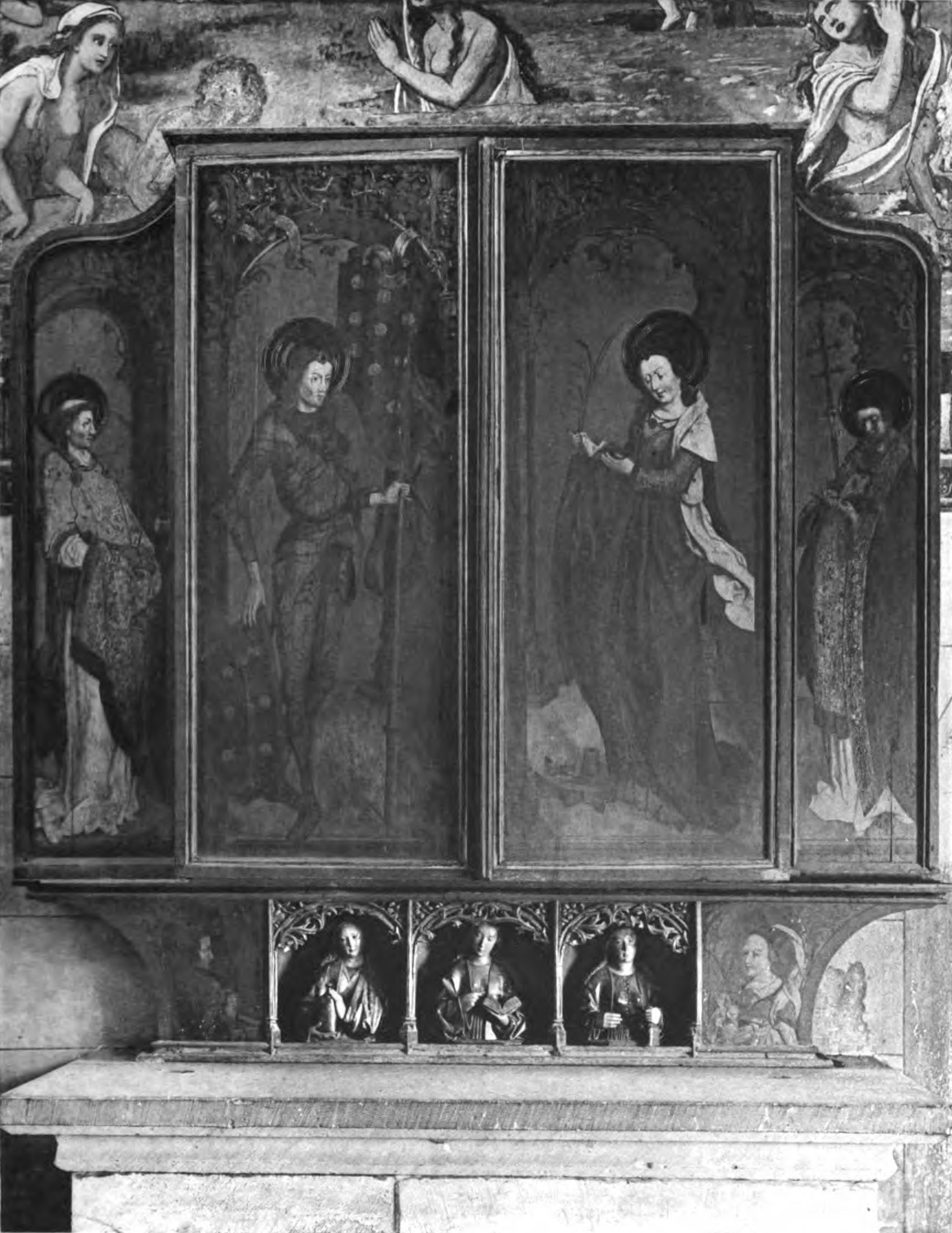 Der um 1500 geschaffene Quirinus-Altar in der Stadtkirche Bad Wimpfen. Außenseite